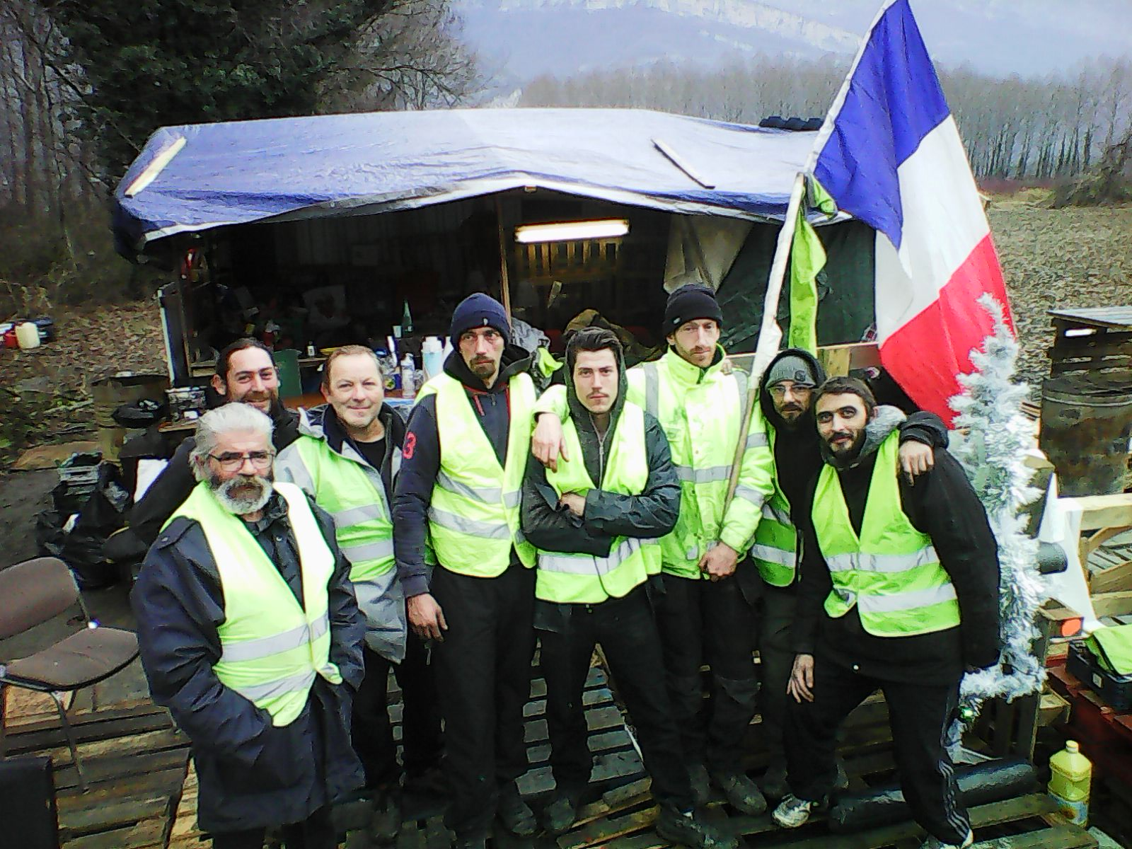 Les gilets jaunes du rond-pont de Voreppe (Isère) le 19 décembre 2018